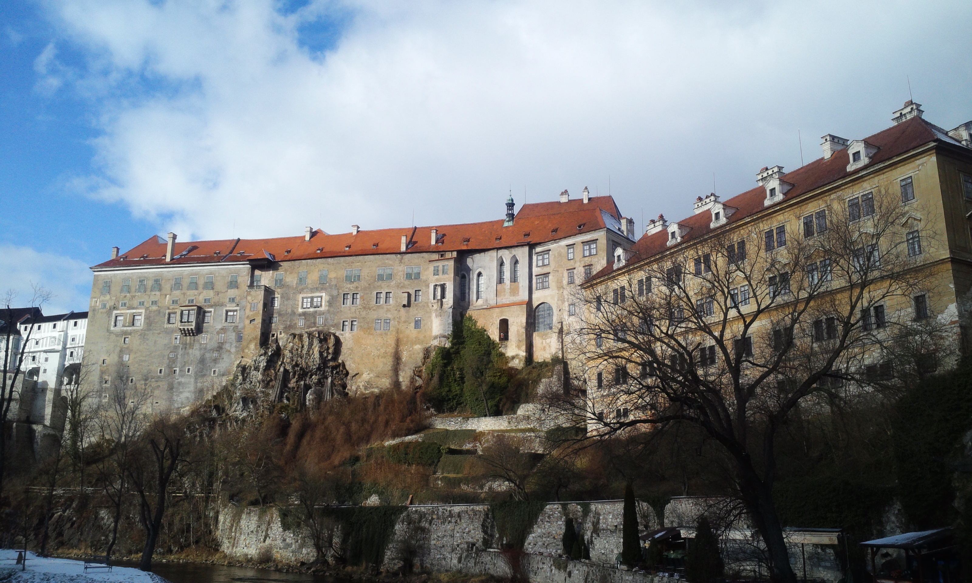 2015년 1월 26일 체스키크룸로프성